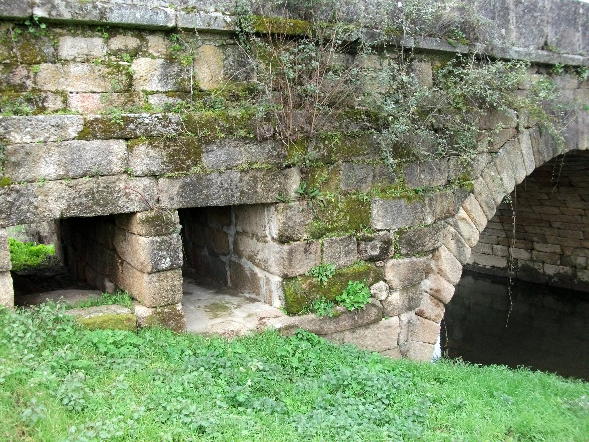 Pormenor lateral a jusante na margem direita da "Ponte de pedra sobre o rio Tuela", também referida como "Ponte Românica sobre o rio Tuela" ou "Ponte de Torre de Dona Chama", na Estrada Nacional 206 em Torre de Dona Chama, Portugal.